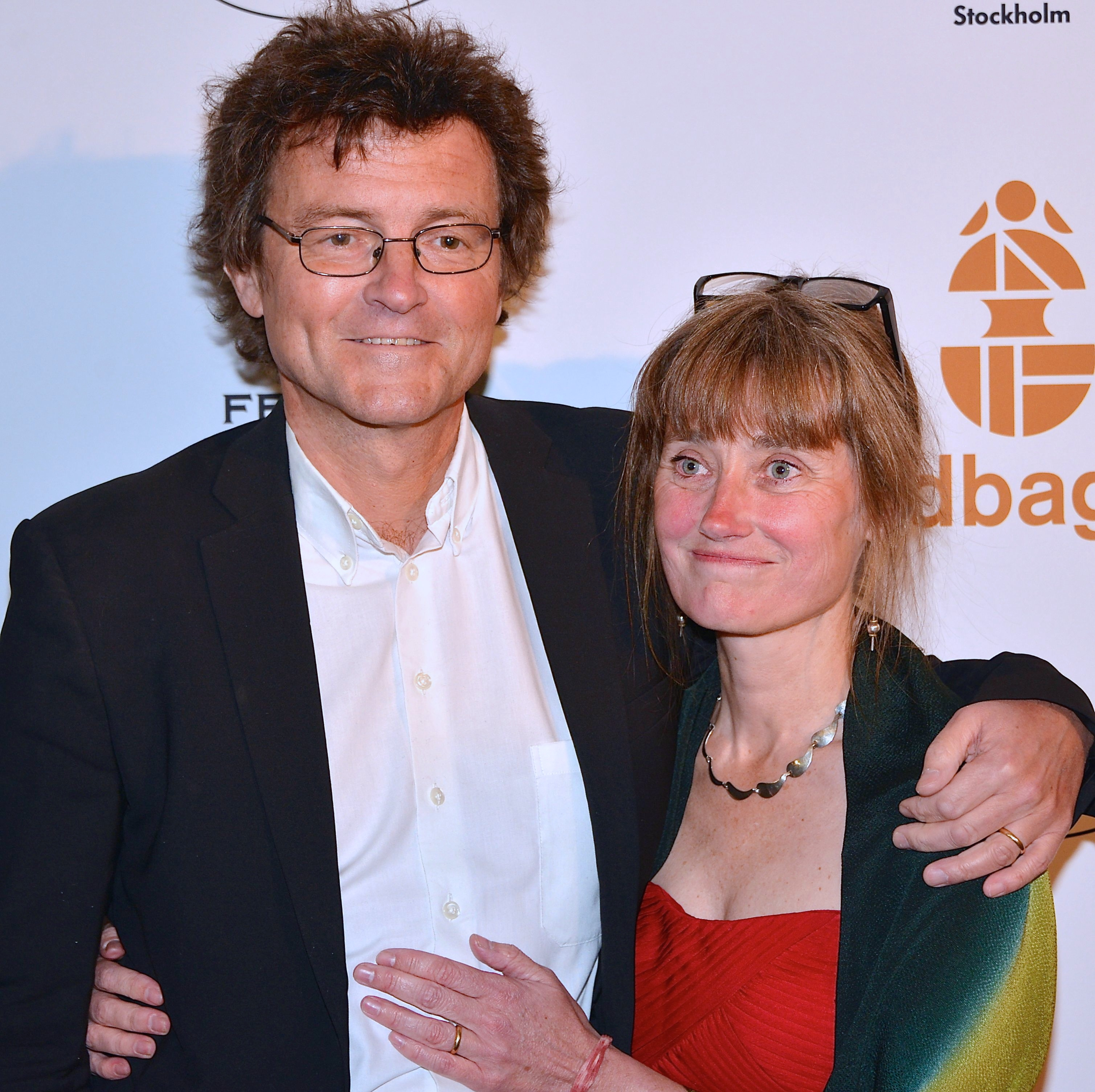 Lars Tunbjörk och Maud Nycander på Guldbaggegalan 21 januari 2013.